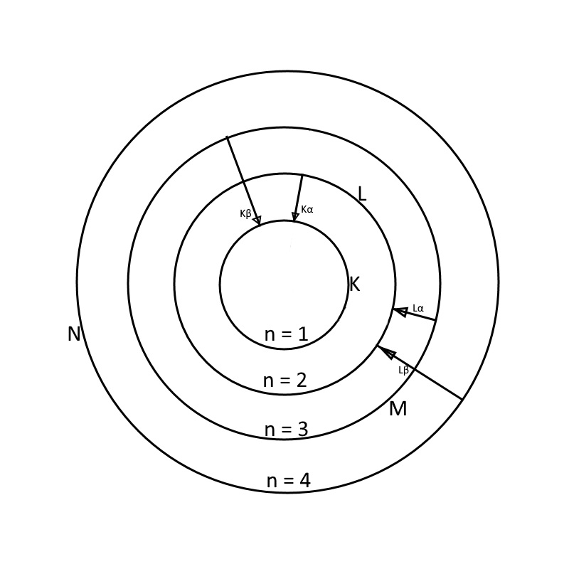 Exemple de types de transitions électroniques avec leur titres